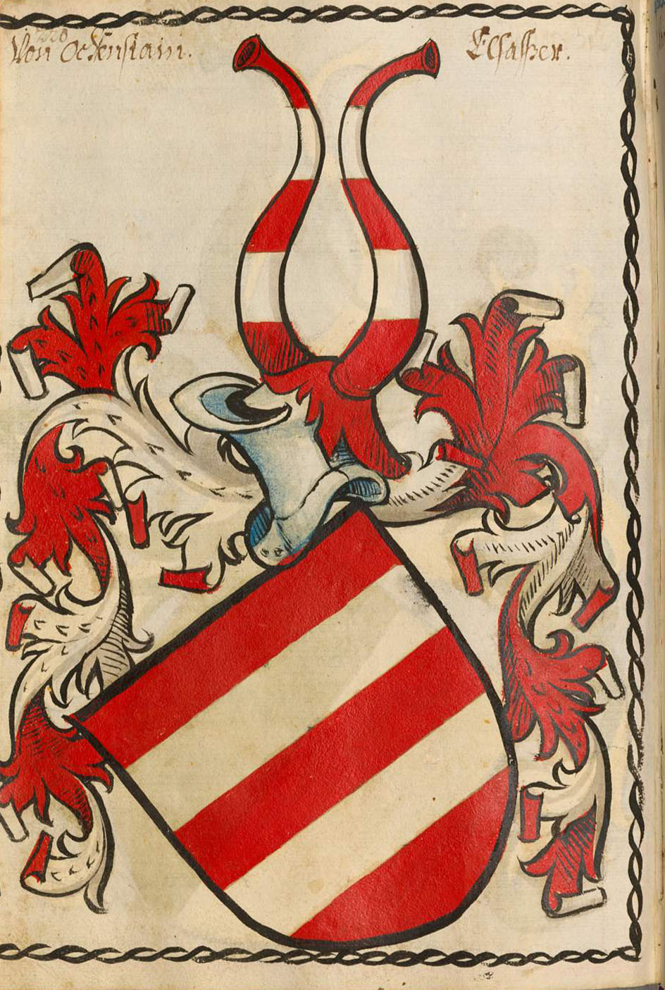 Scheibler'sches Wappenbuch , älterer Teil Elsässer Seite 220